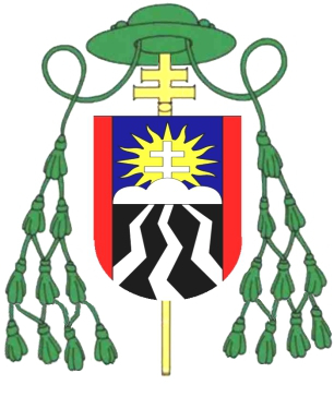 Wappen Dominik Hrušovský * 1926 Weihbischof von Trnava und Bratislava (1992-1996)